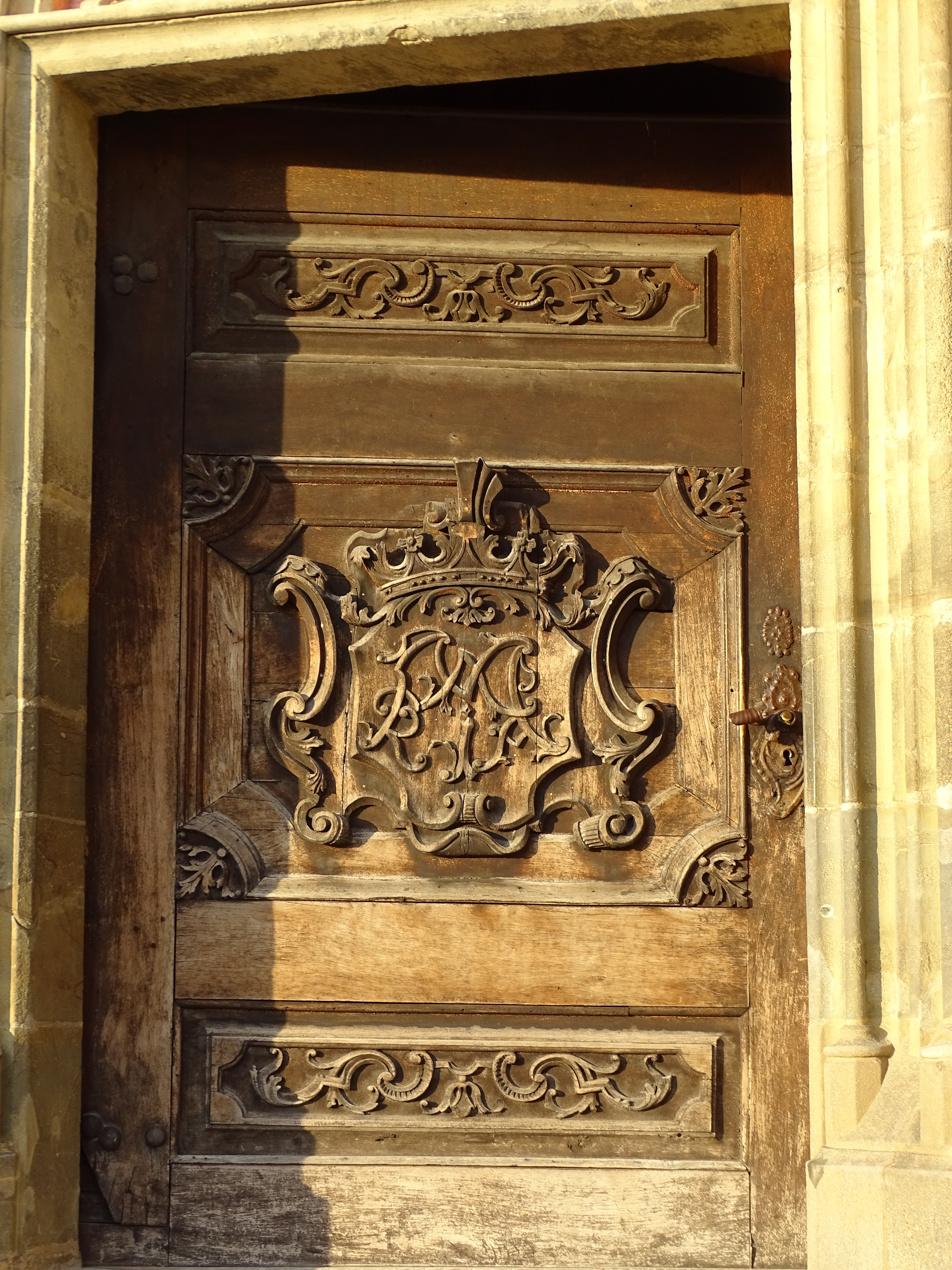 Die Tür des Südportals der Wallfahrtskirche Maria Straßengel